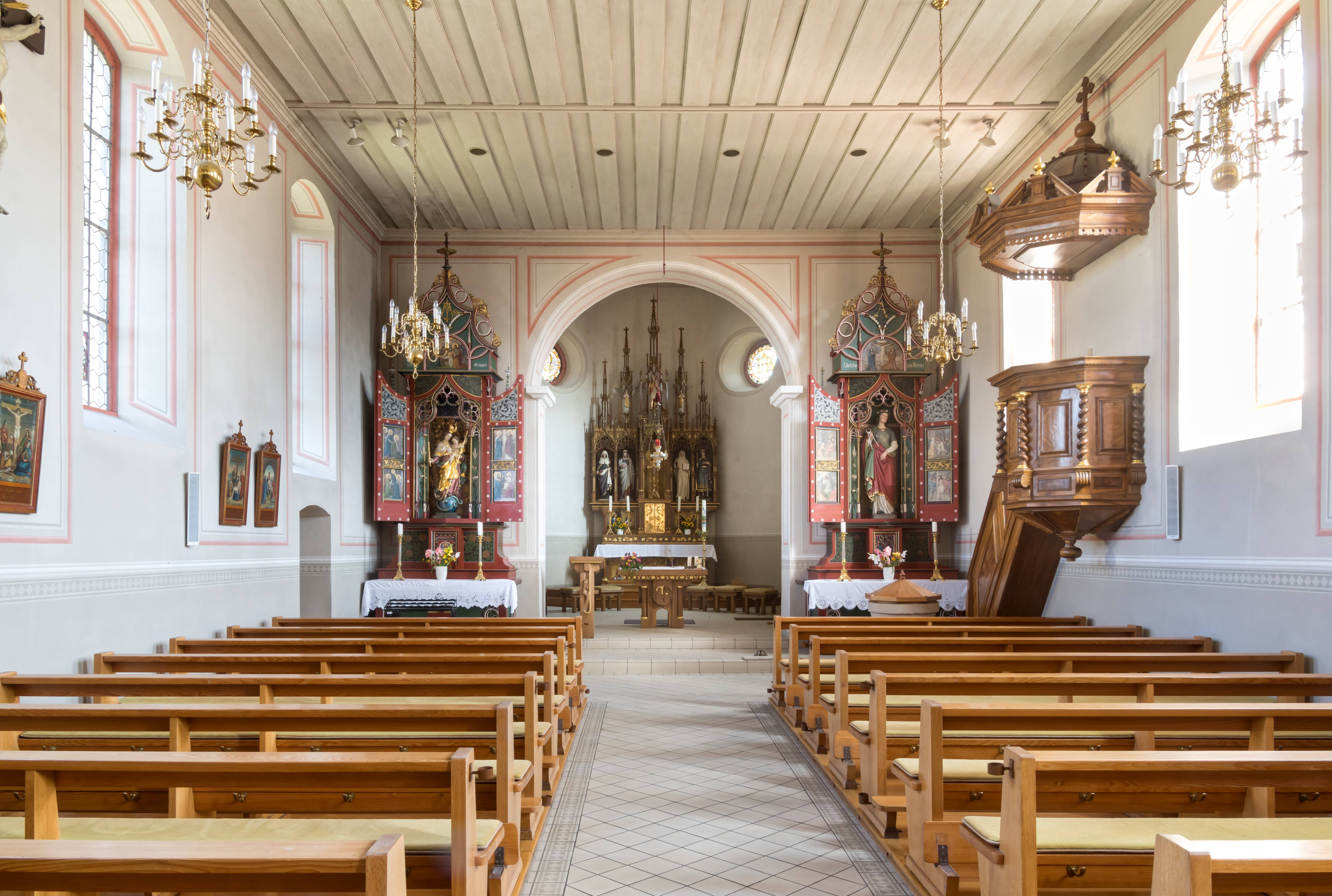 St. Agatha in Grunern, einem Teilort von Staufen Blick zum Chor und Altar